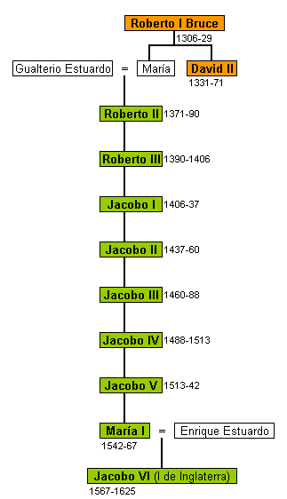 Árbol genealógico de los reyes de Escocia de las casas de Bruce y Estuardo